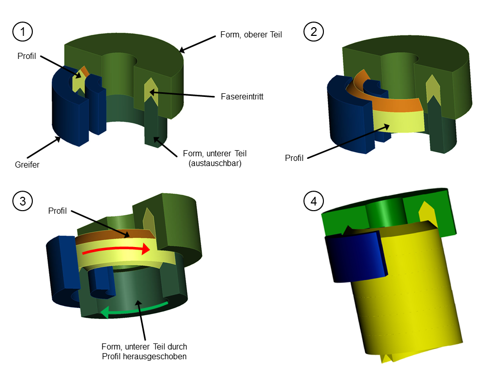 Rohrherstellung